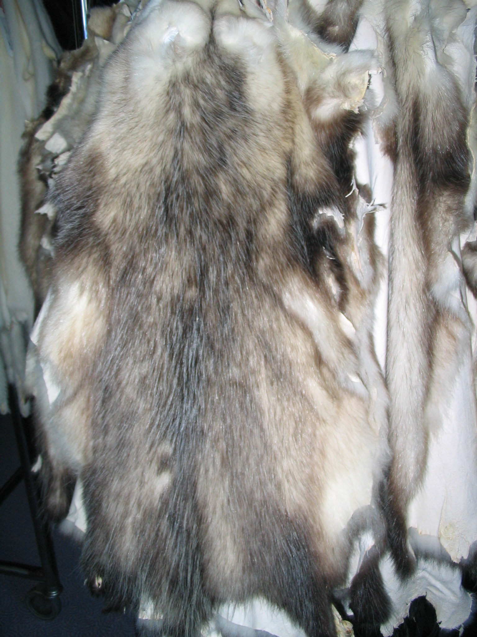 Amerikanisch Opossumfelle